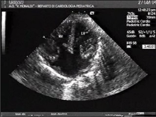 Ultraschalldarstellung eines kompletten Atrio-ventrikulärer Septumdefektes (CAVC)